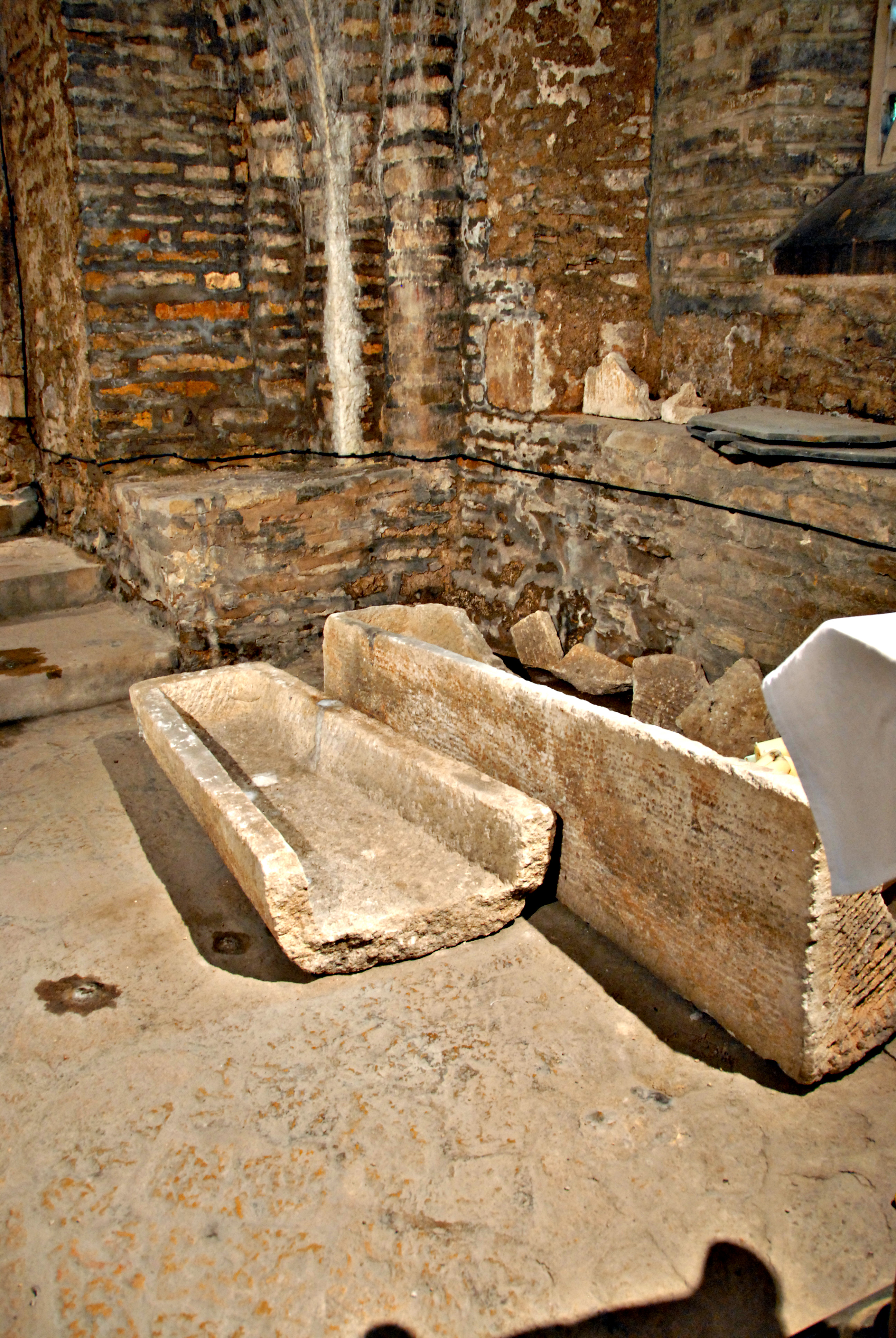 St-Bénigne, Krypta, Kapellenanbau, Sarkophage